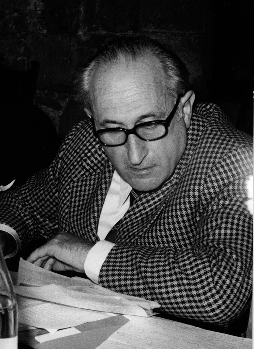 Yon Etxaide 1976an